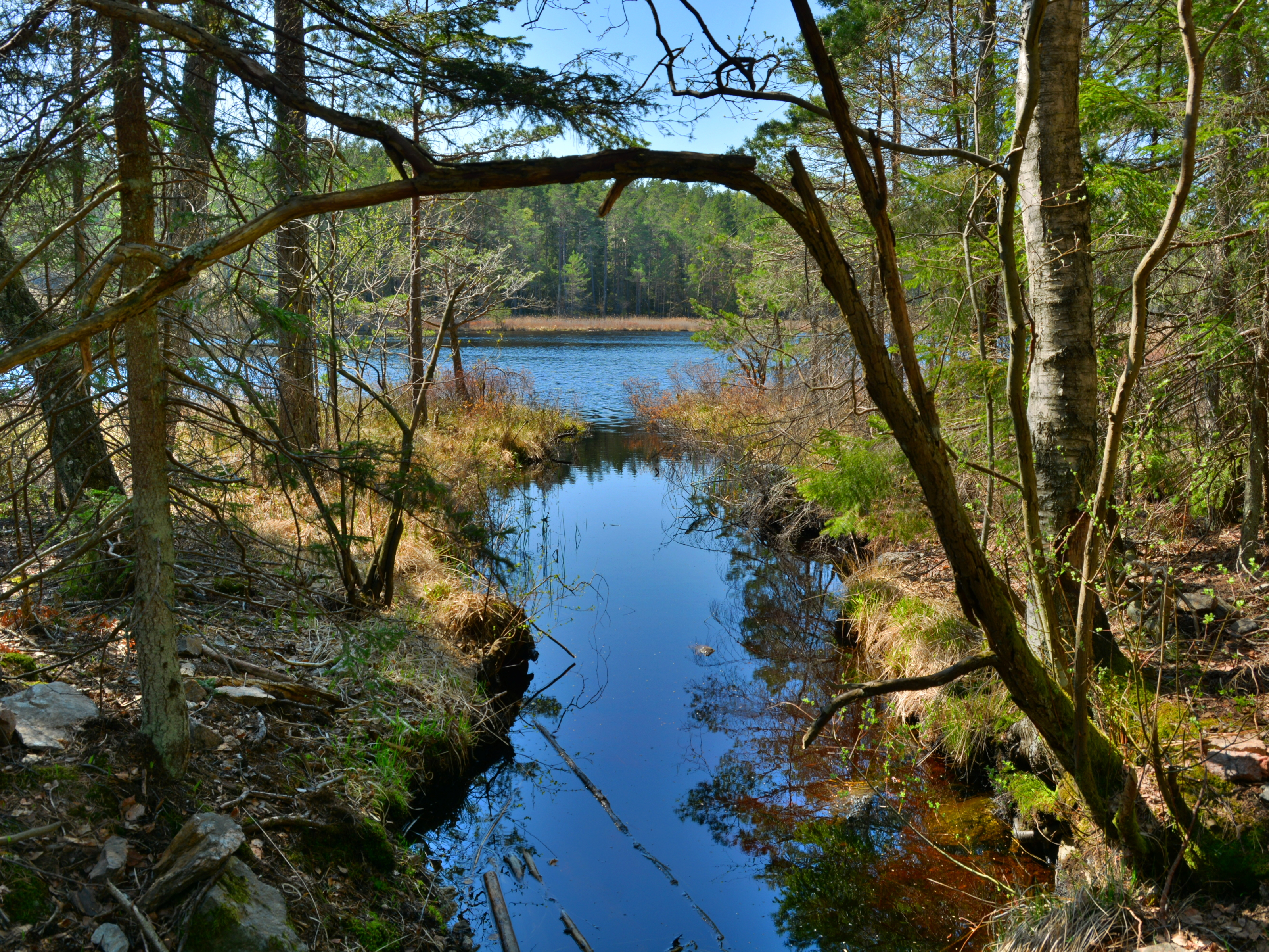 Utloppet från Åva träsk, Tyresta naturreservat.